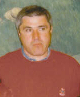 Photo du joueur de football puis entraîneur adjoint d'Élie Baup, Daniel Sanchez lors de la saison 2004-2005. Cette photo a été prise par Mickaël Roure alias Altrensa pour Wikipédia. Elle ne saurait être utilisée sans la mention de son auteur. D'avance merci.